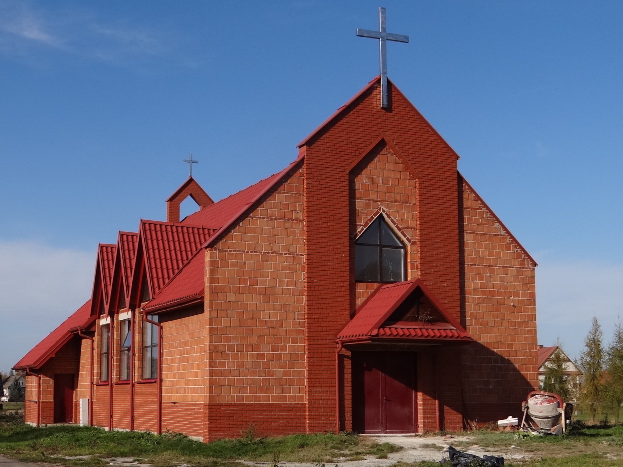 Kościół w Stradomce (w budowie)